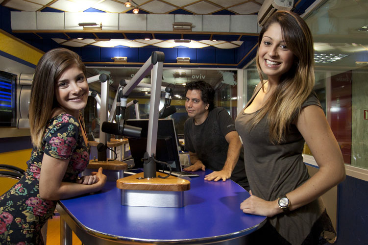 SAO PAULO, SP, BRASIL, 23-03-2012, 16h00: da esquerda para direita: Aline Costa (a Vicky), 24, Marcelo Barbur, 35 e Amanda Bello (a Barbie) apresentadores do Programa Chupim da Radio Metropoitana. (Foto: Ze Carlos Barretta/Folhapress AGO-SHOW)